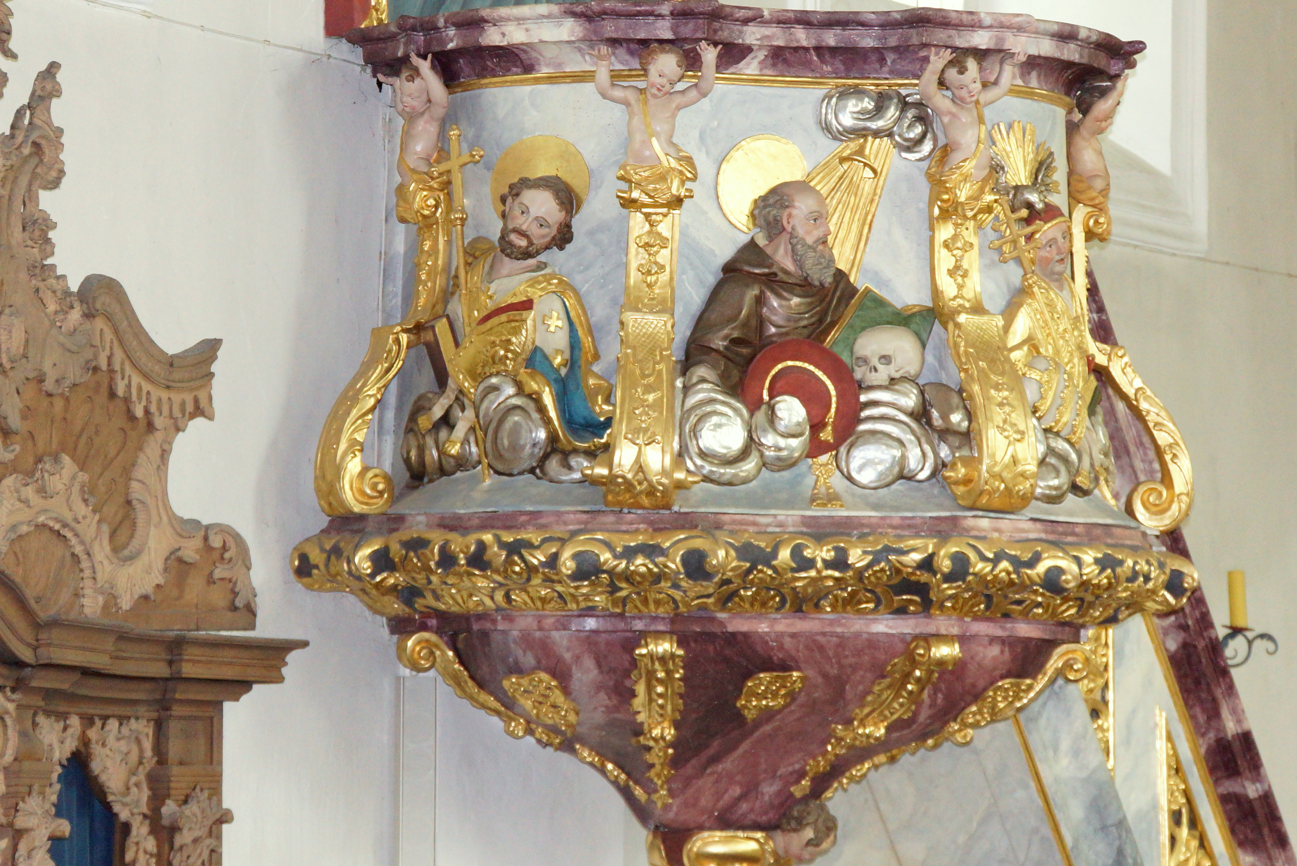 Die katholische Wallfahrtskirche Maria-Hilf im Oberpfälzischen Beratshausen